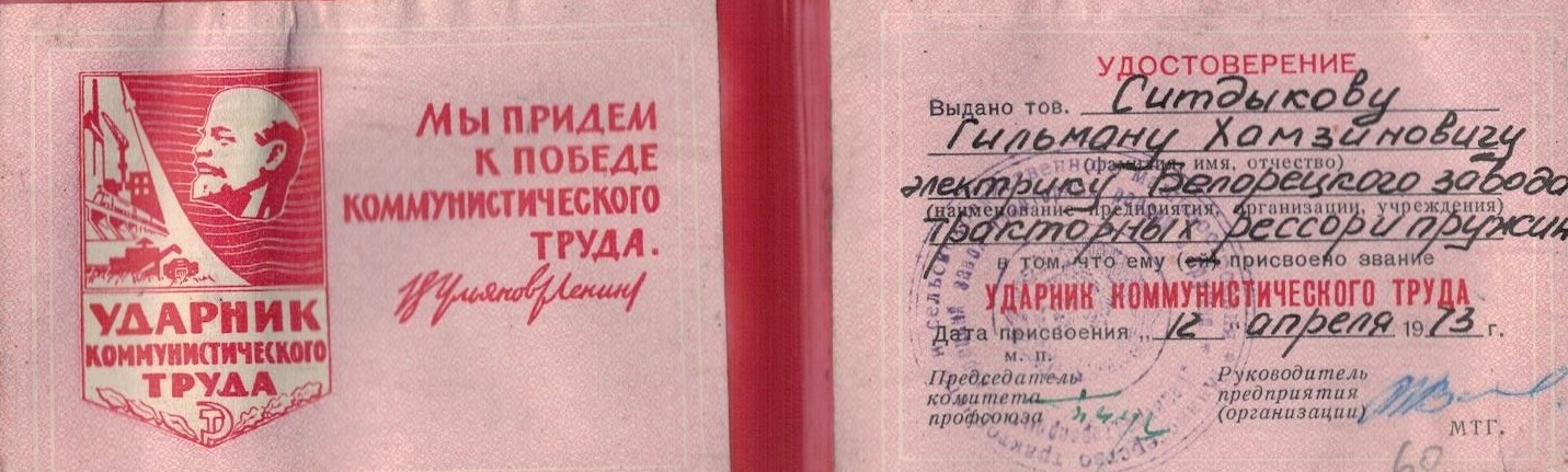 Коммунистик хеҙмәт ударнигы танытмаһы